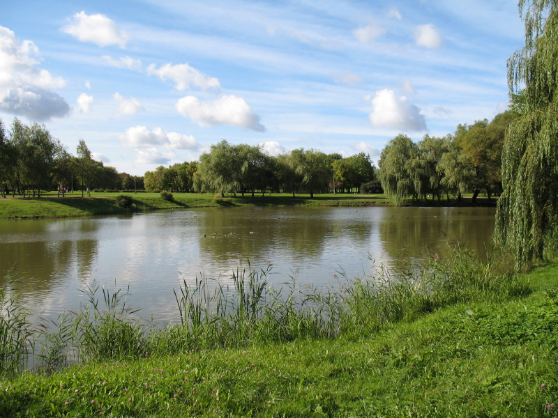 Kalniečių parkas, Kaunas.